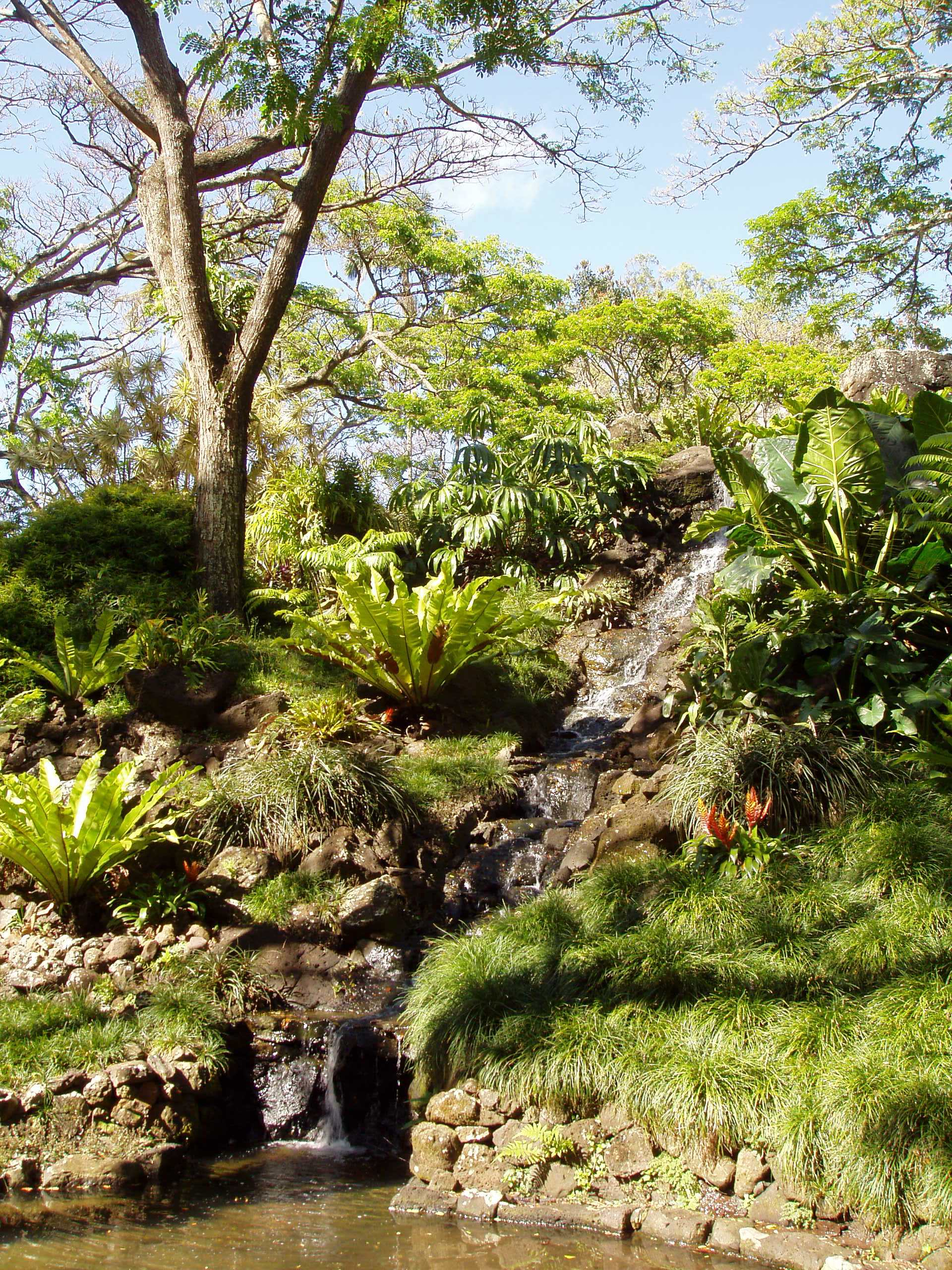 Allerton Garden, Kauai, Hawaii - stream.